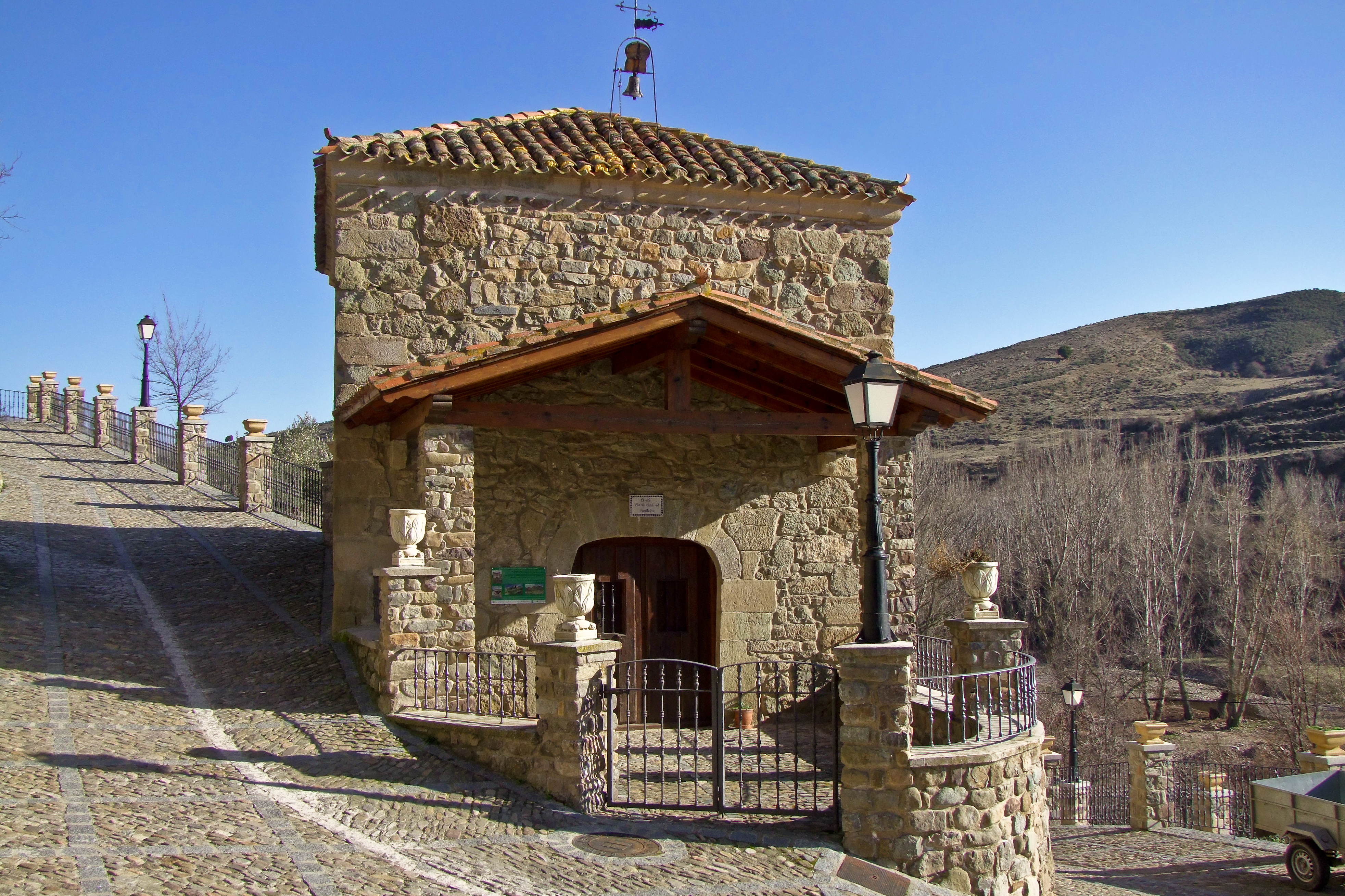 Ermita del humilladero en la localidad de Jalón de Cameros, La Rioja - España